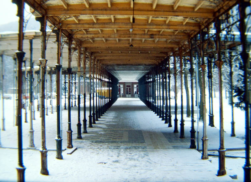 La Galerie Léopold II sise dans le parc des Sept Heures (classé par arrêté royal du 13 janvier 1977) à Spa